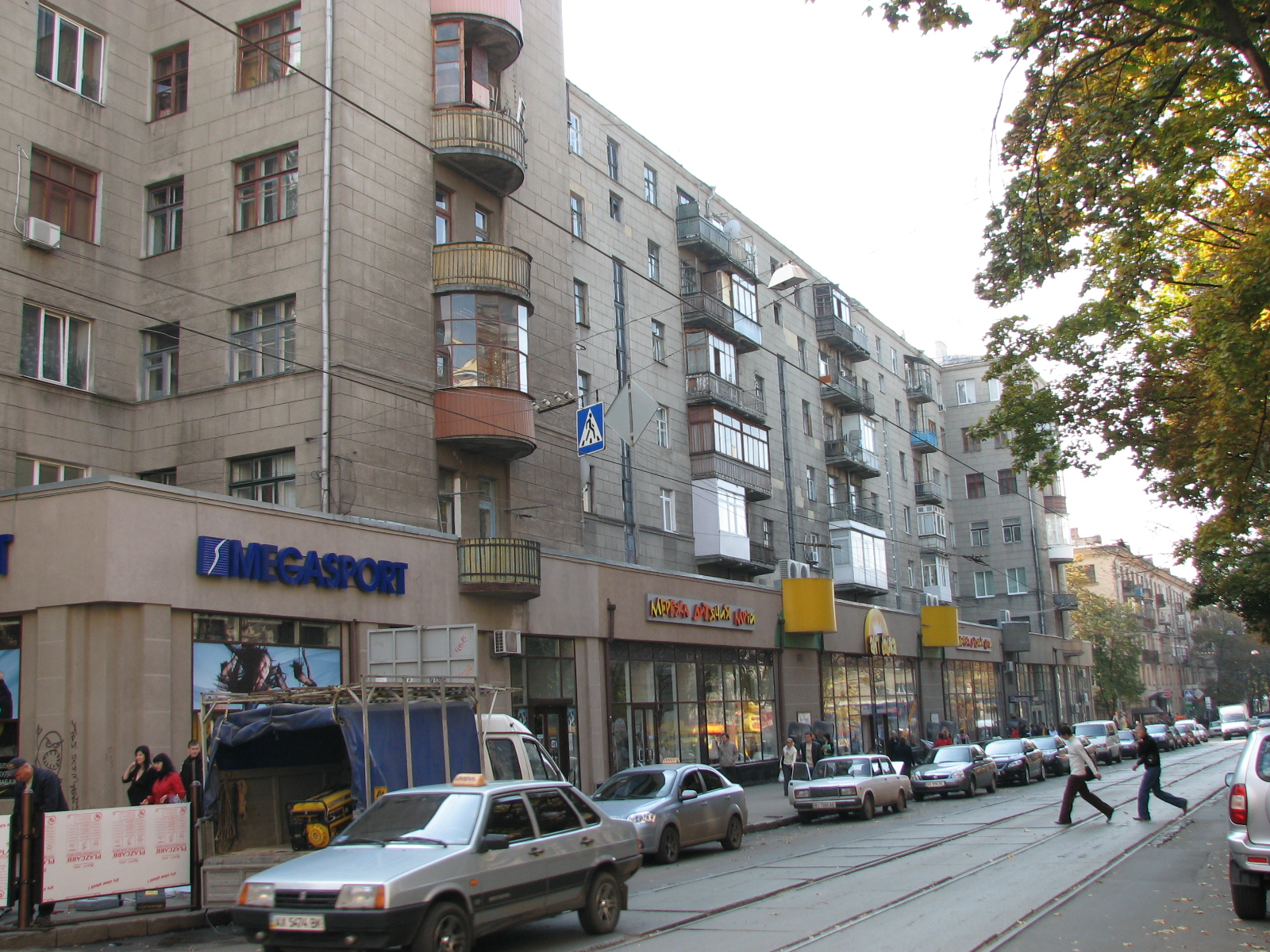 Житловий будинок з магазином — будинок, у якому жили Кошкін М.І. й Морозов О.О. - рад. конструктори танків, вул. Пушкінська, 54